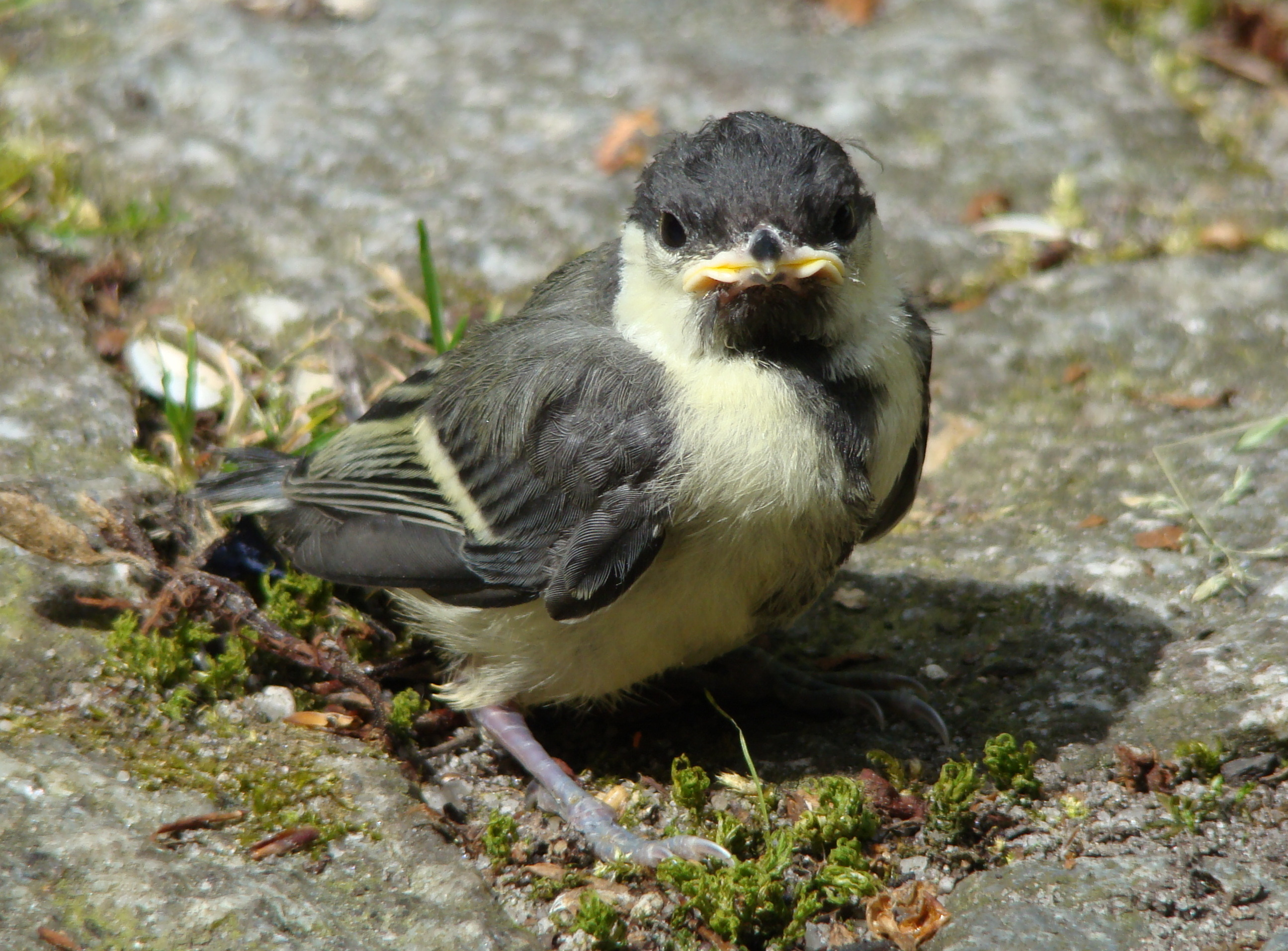 Kohlmeisen-Küken